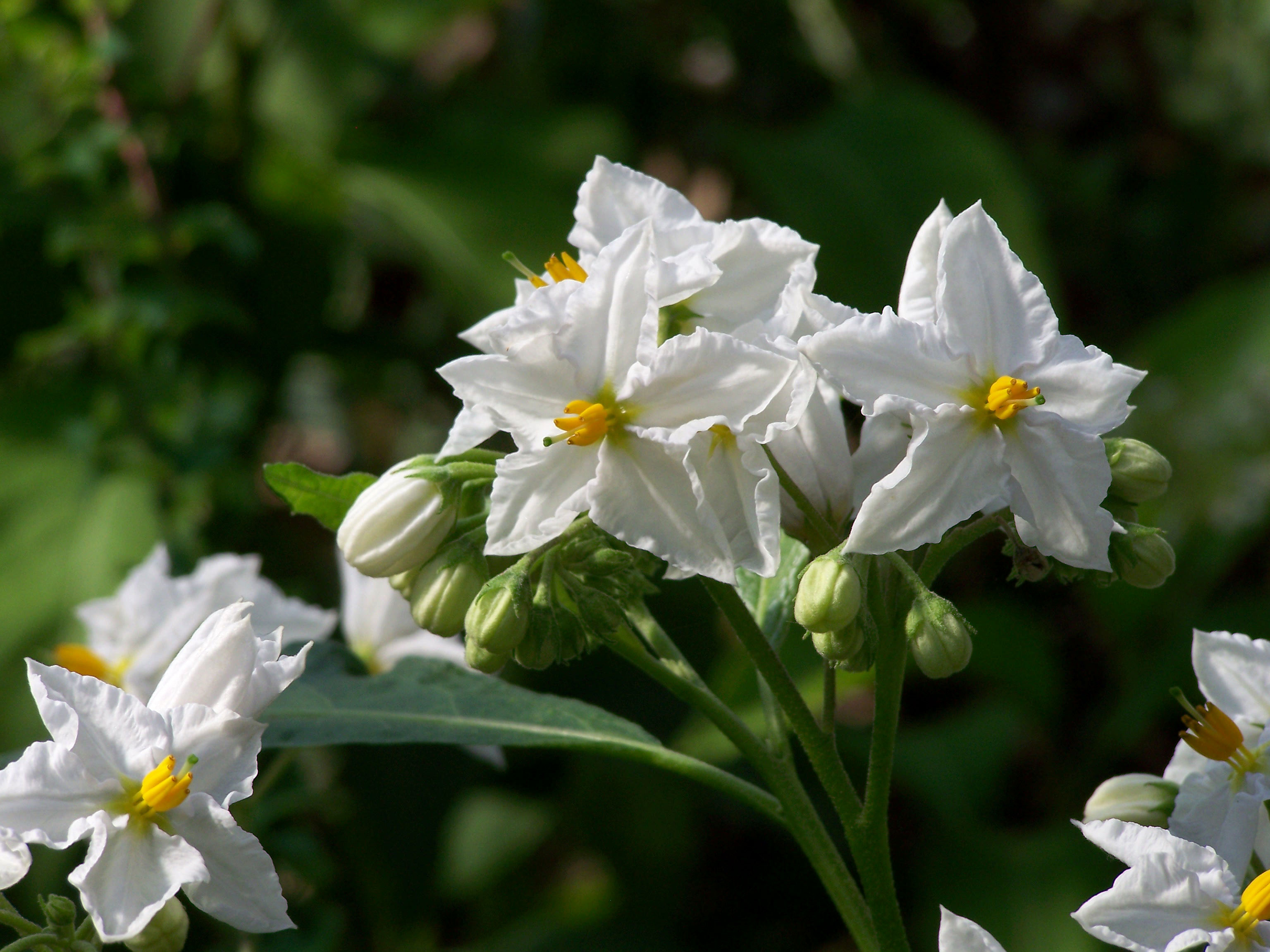 Buenos-Nachtschatten (Solanum bonariense), Botanischer Garten Berlin.